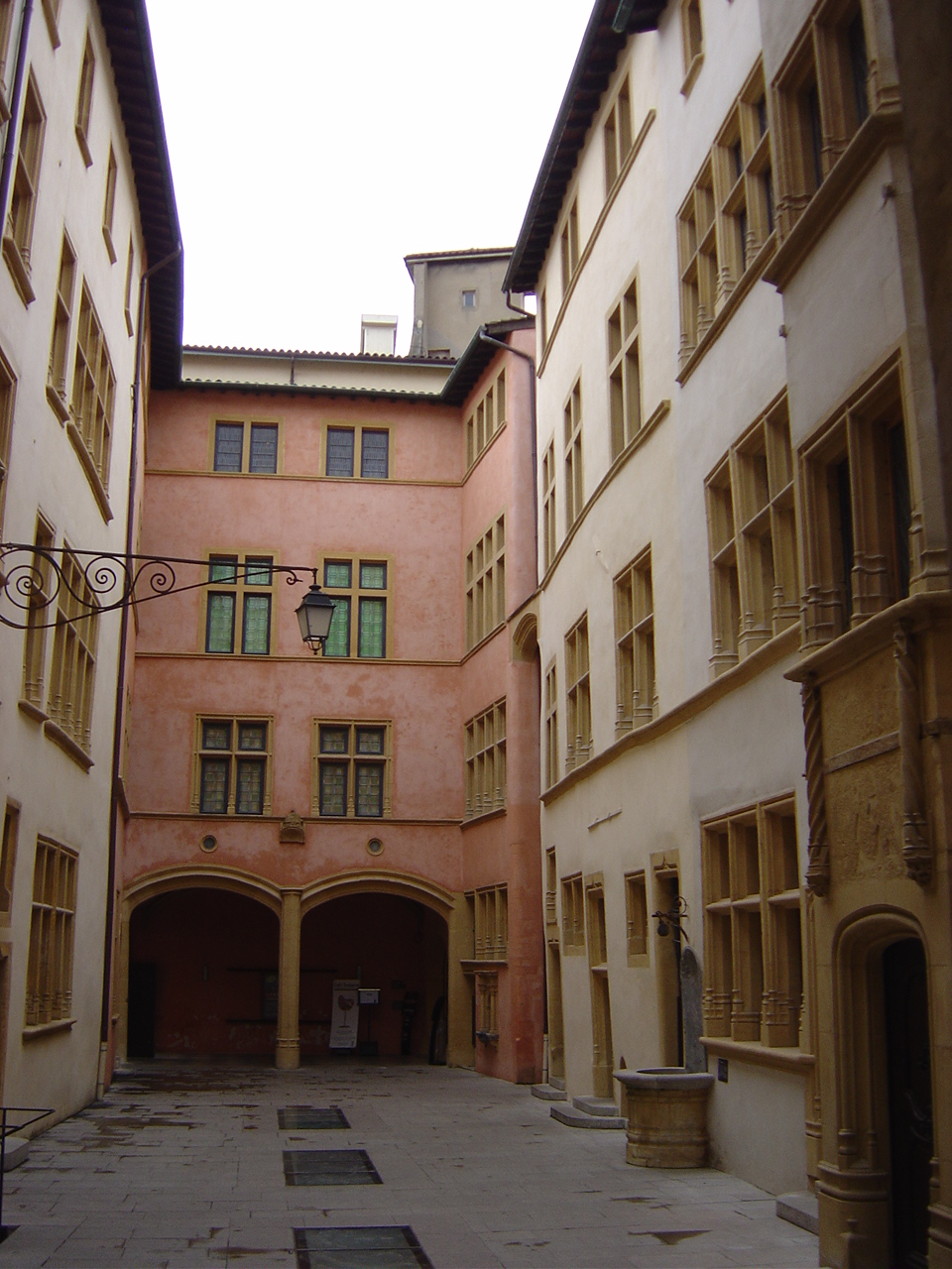 Hôtel de Gadagne (cour).